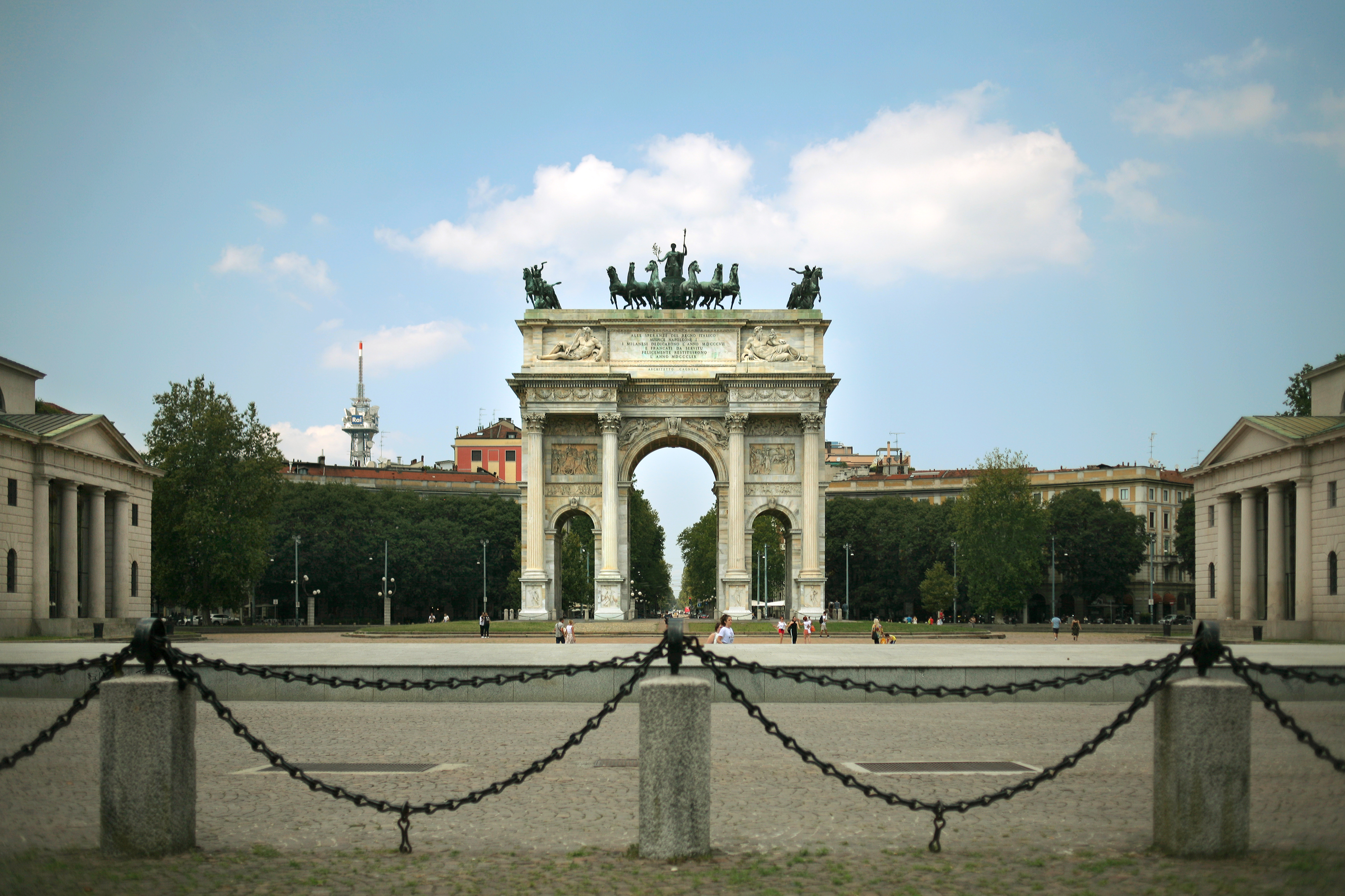 Veduta dell'Arco della Pace di Milano dal Parco Sempione. Architetto Cagnola